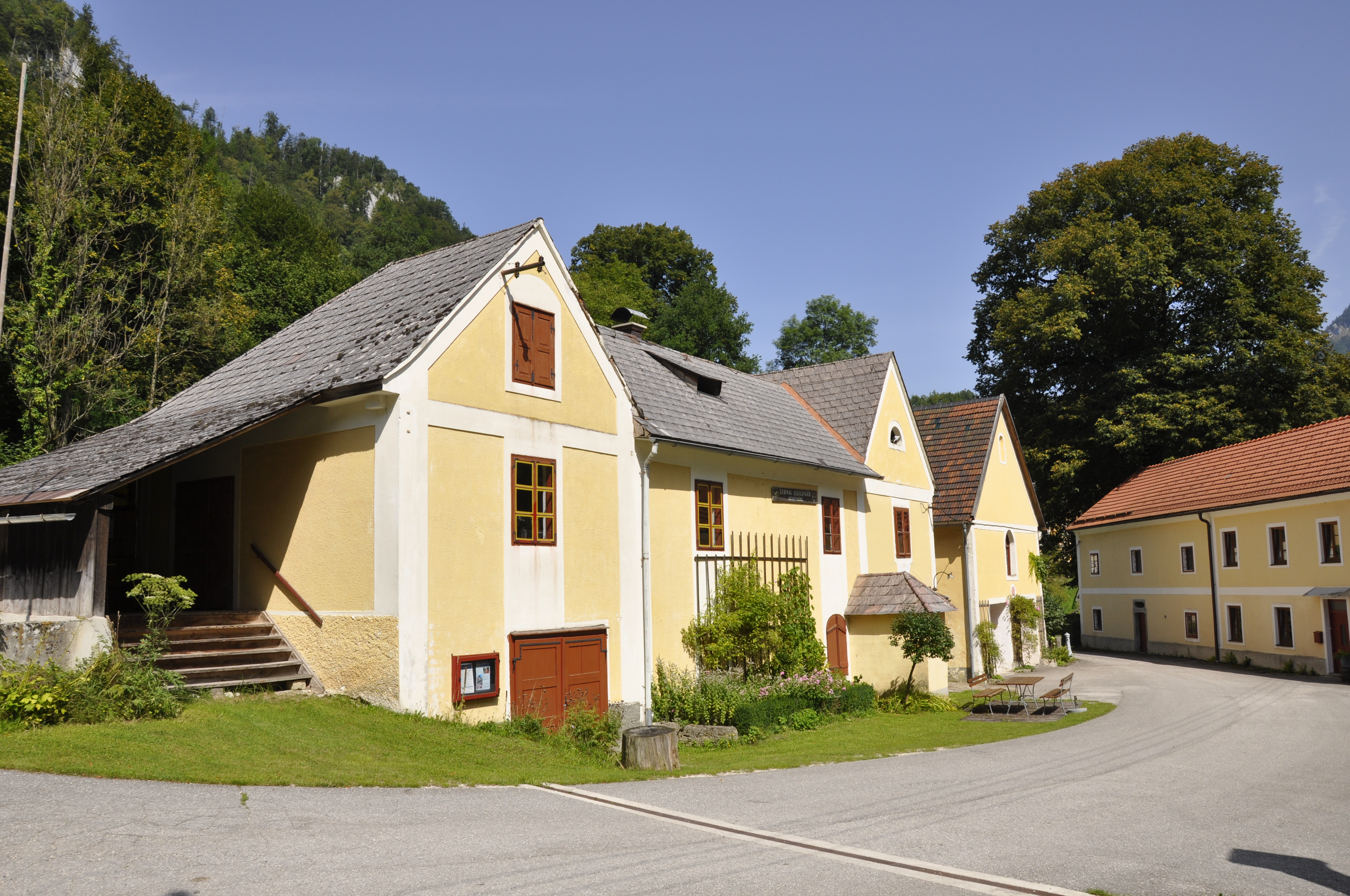 Kram, Bereitstellung der Sensen zum Versand